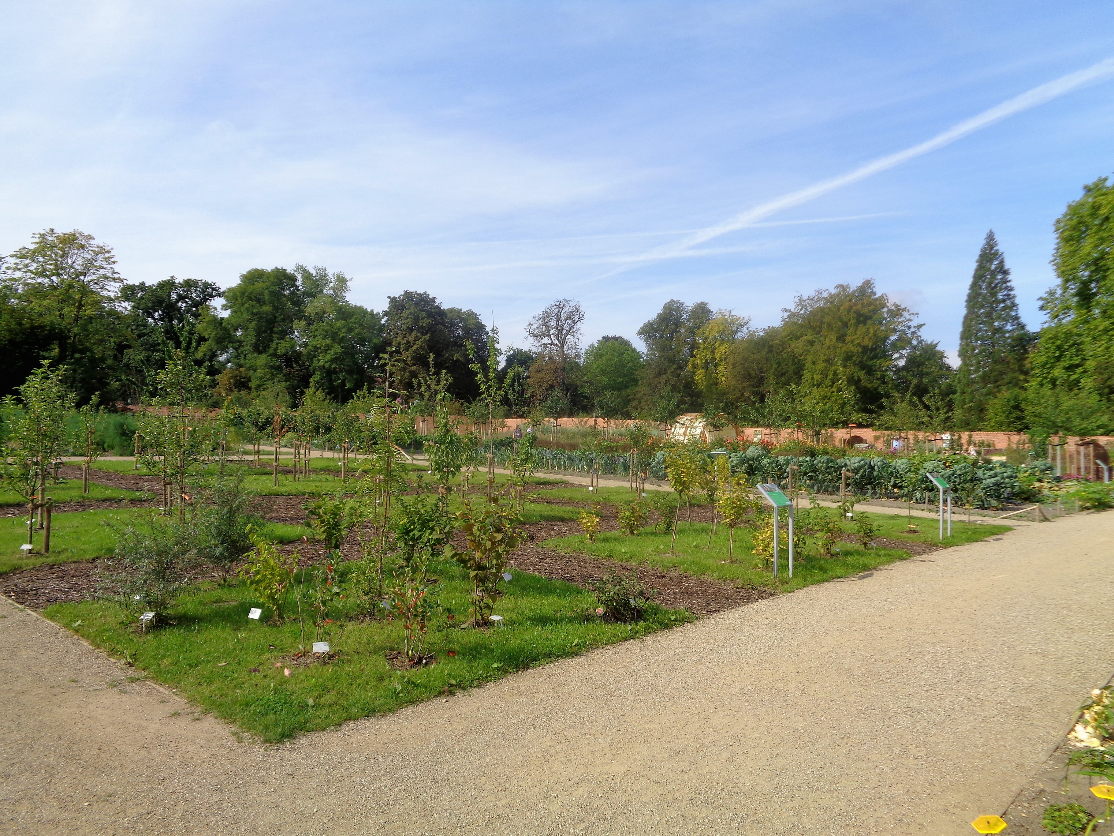 Der nach historischem Vorbild neu angelegte Küchengarten im Eutiner Schlosspark.